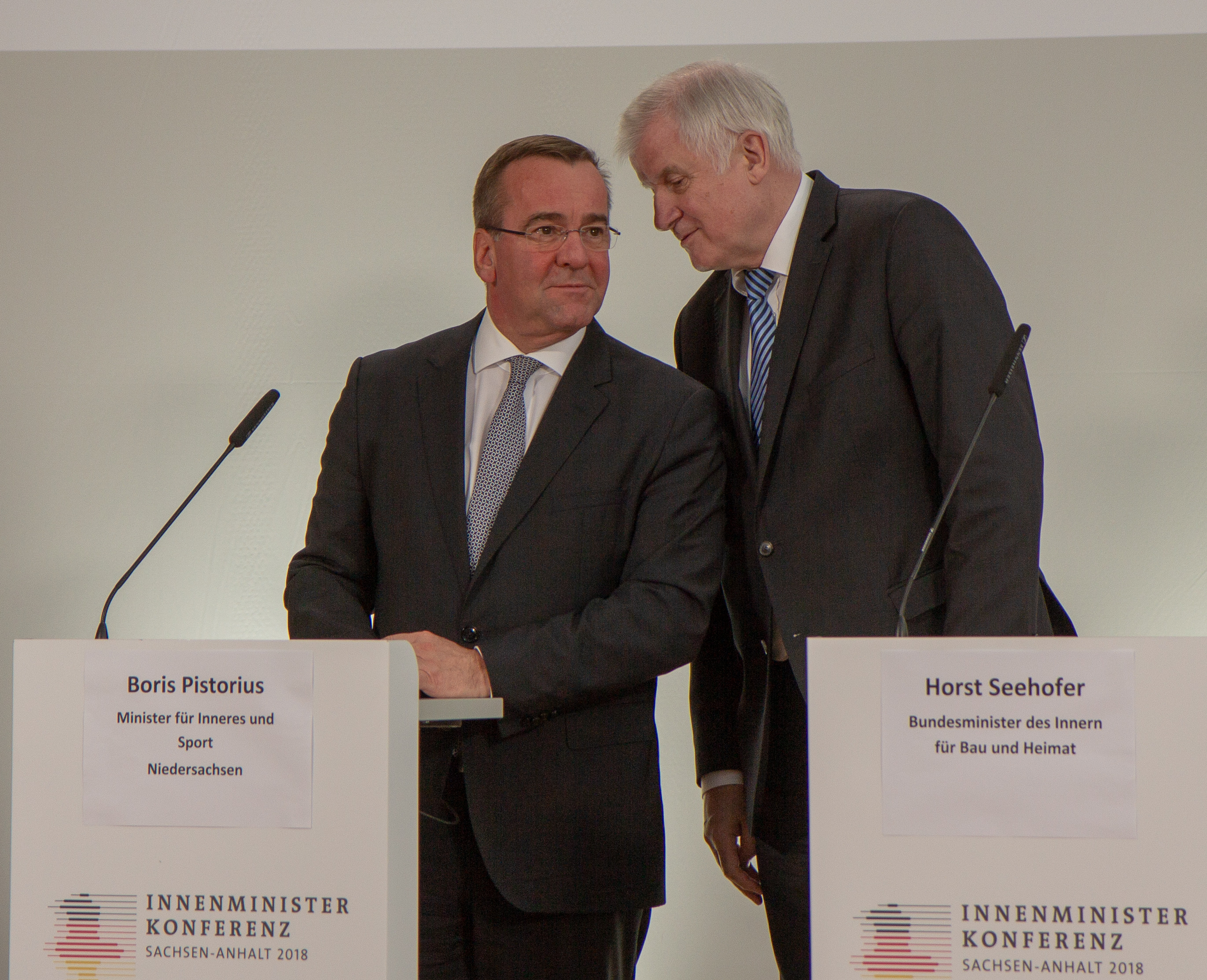 Boris Pistorius auf der Pressekonferenz zum Abschluss der 209. Innenministerkonferenz vom 28.-30. November in Magdeburg